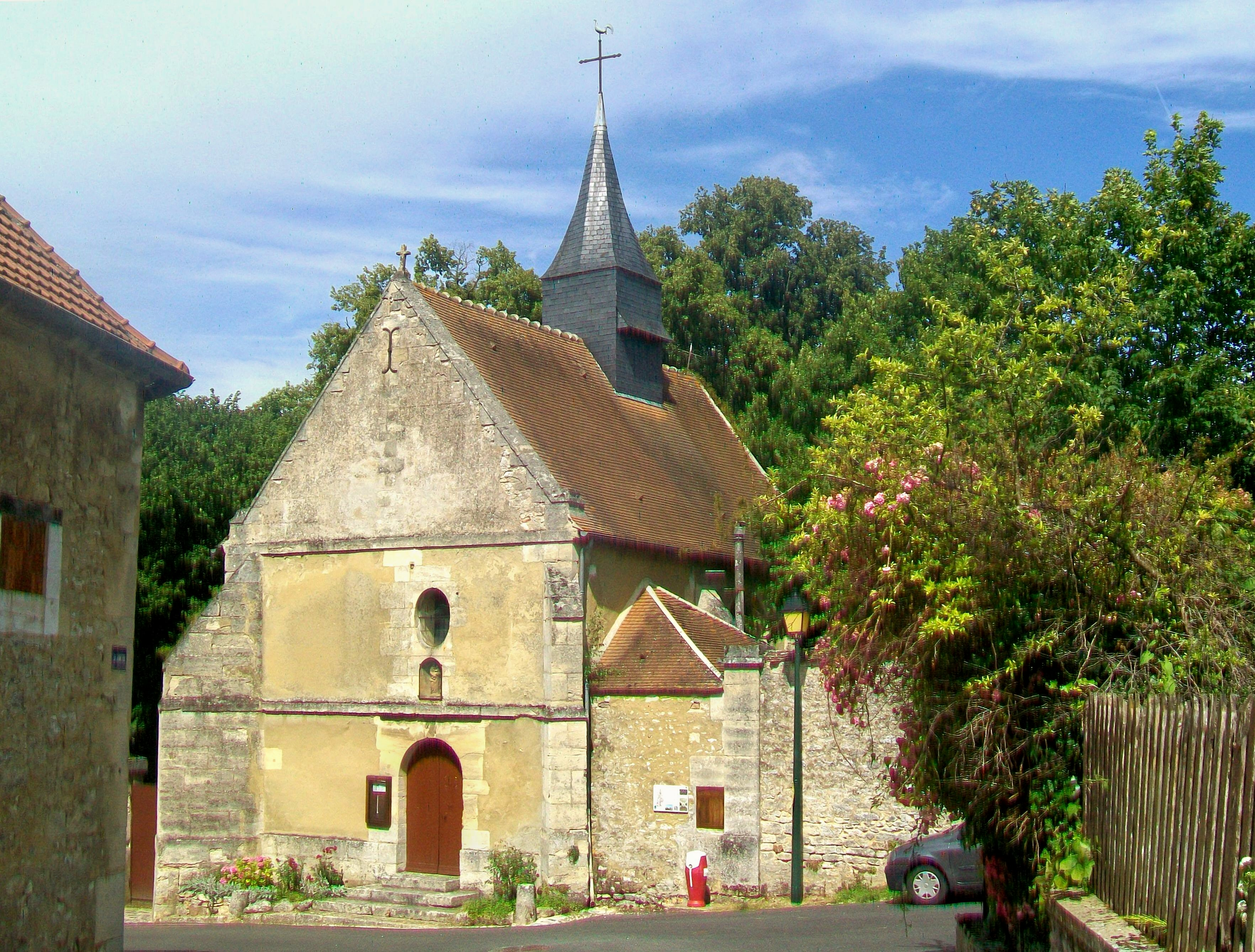 La chapelle Sainte-Marguerite, façade ouest (la seule donnant sur la voie publique).